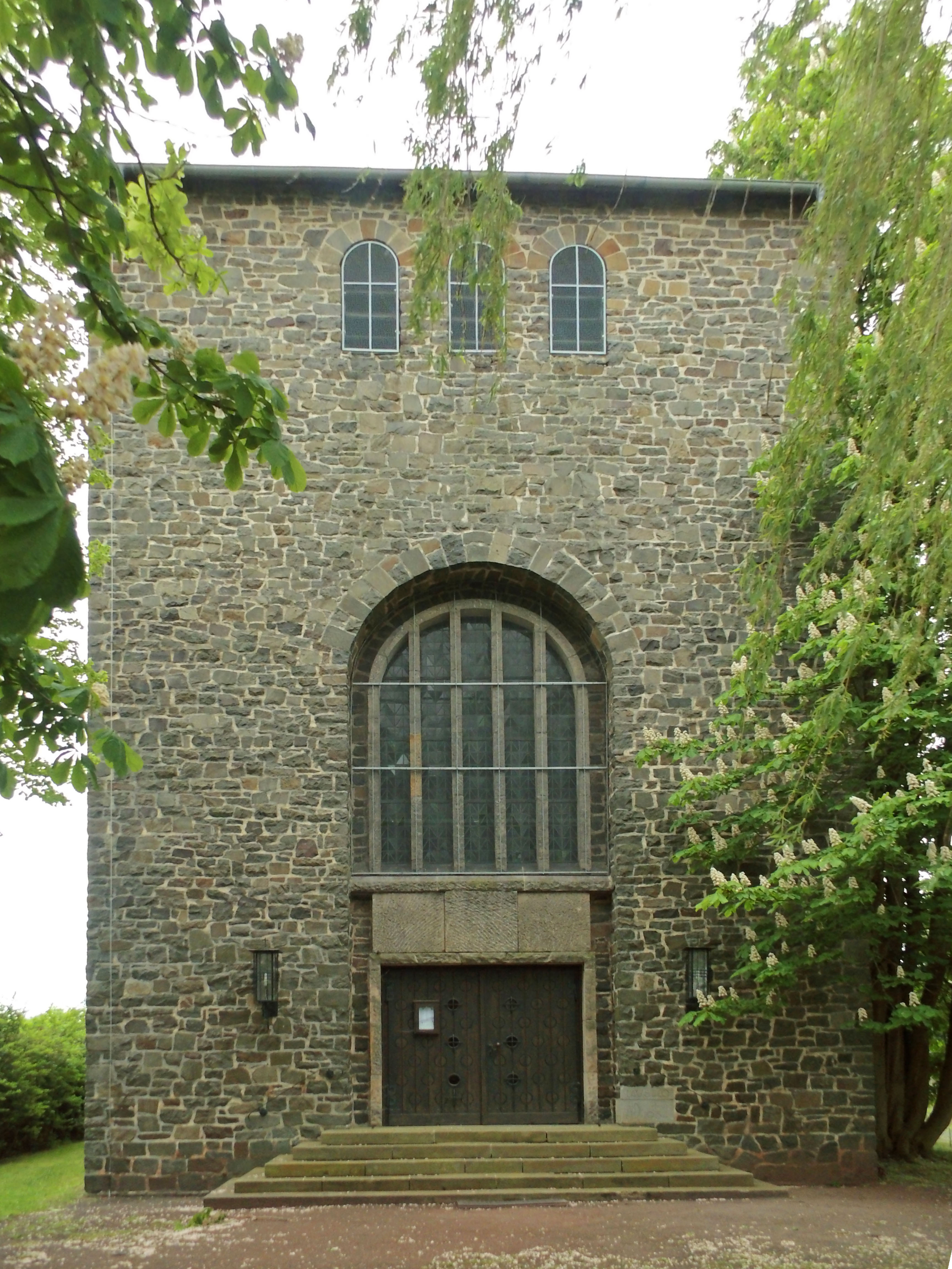 Turm der römisch-katholischen Heilig-Kreuz-Kirche in Bismark (Altmark)